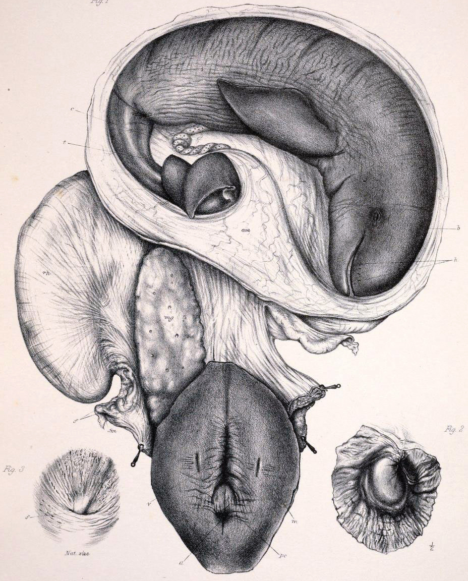 Orcaella brevirostris foetus in uterus.